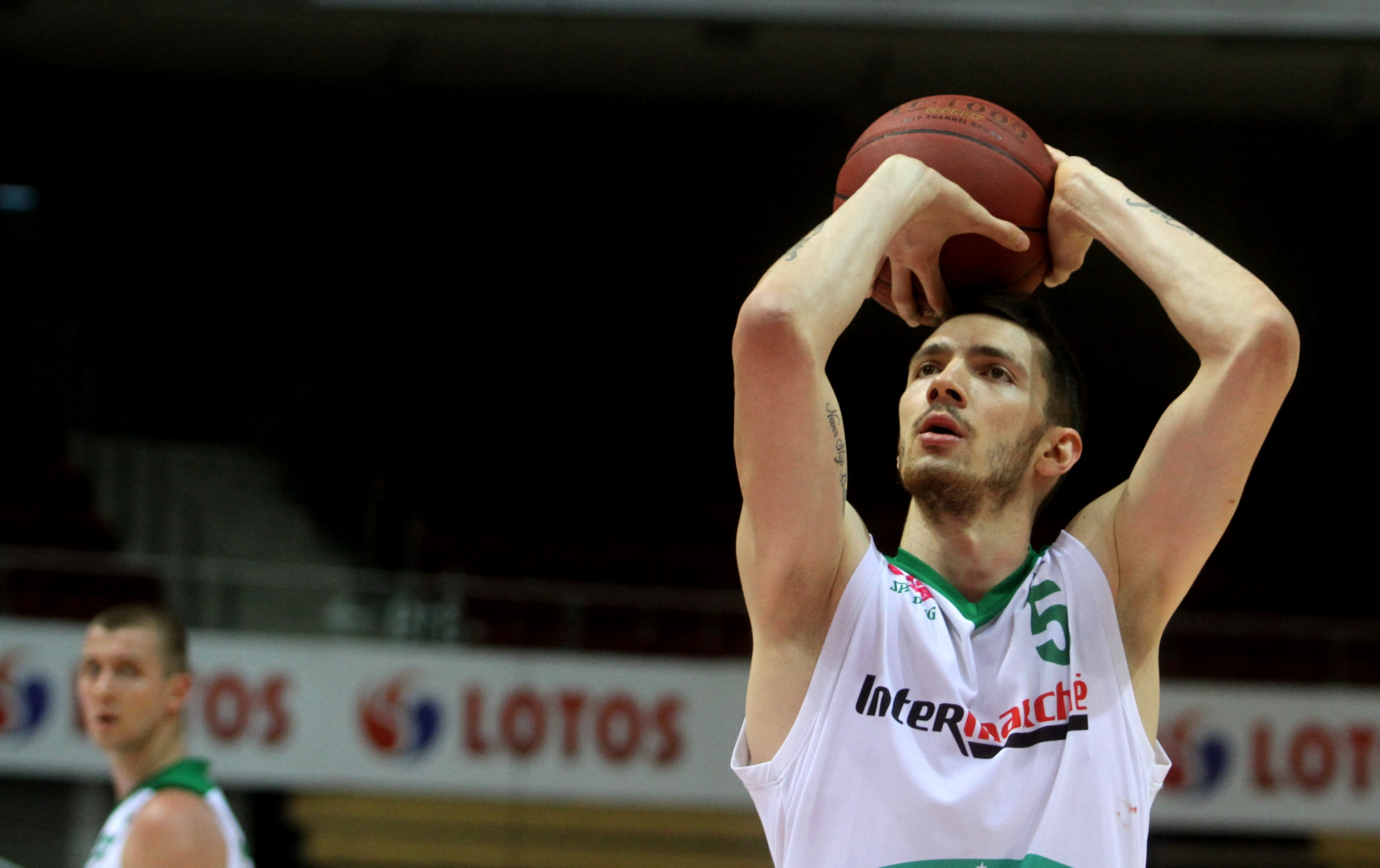 Aaron Cel Stelmet Zielona Góra